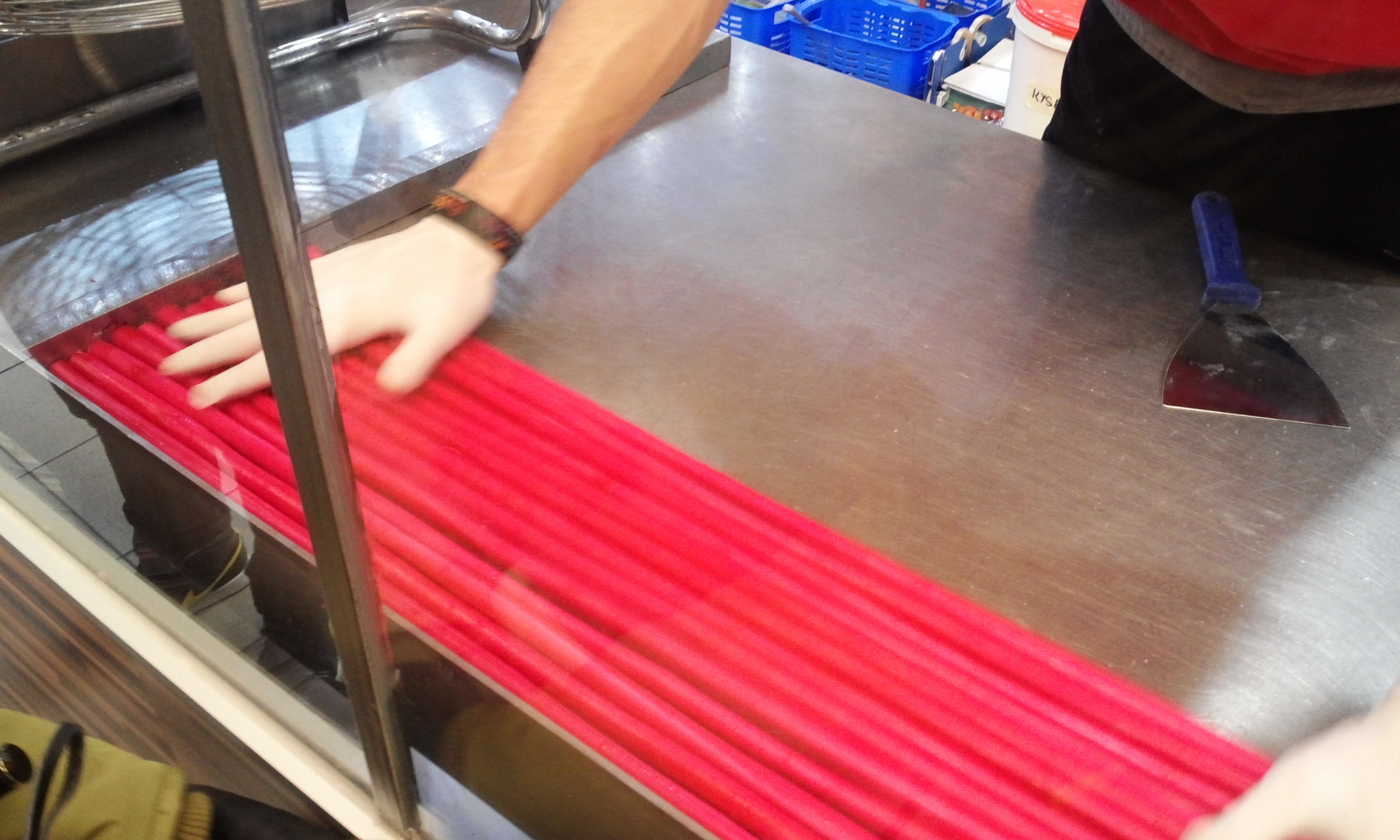 2015년 1월 25일 프라하의 수제사탕 공장